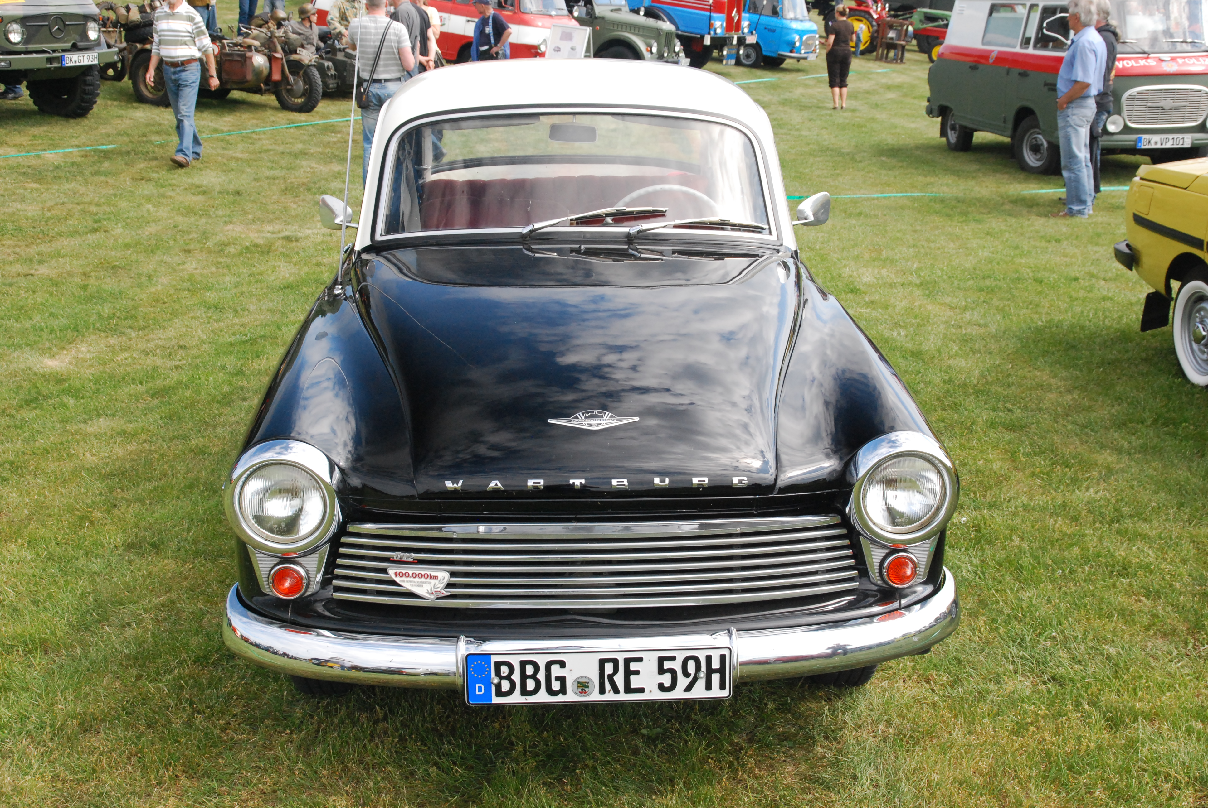 DWartburg 311